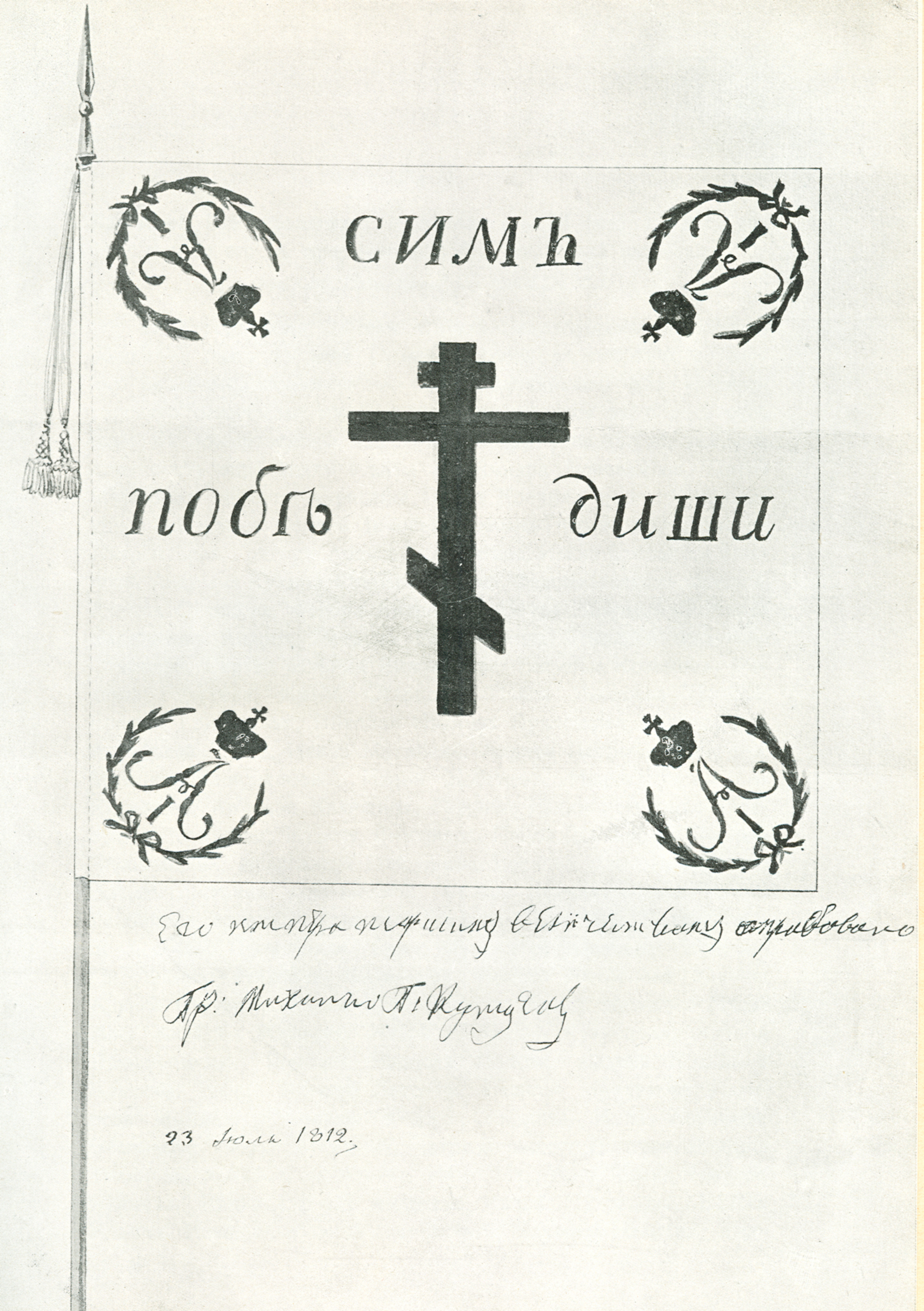 Высочайше утвеоржденный 23.07.1812 г. рисунок знамени С.-Петербургского народного ополчения